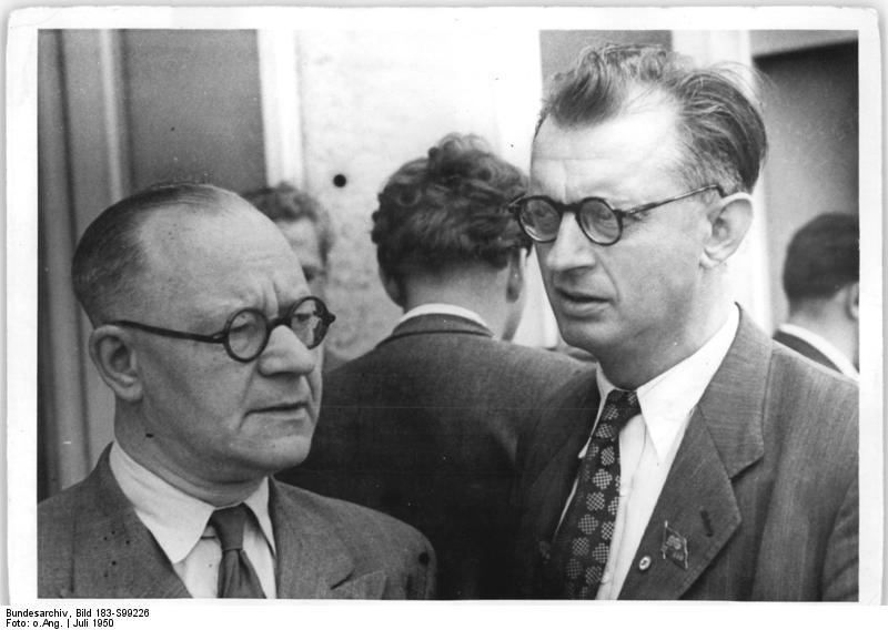 Zentralbild Ben-Rich III. Parteitag der Sozialistischen Einheitspartei Deutschlands vom 20. bis 24. Juli 1950 in der Werner-Seelenbinderhalle in Berlin UB.z.: Der belgische Delegierte Raymond Dipsy (links) im Gespräch mit Dominique Urbany, Generalsekretär der KP Lux. 7293-50 Information added by Wikimedia users.